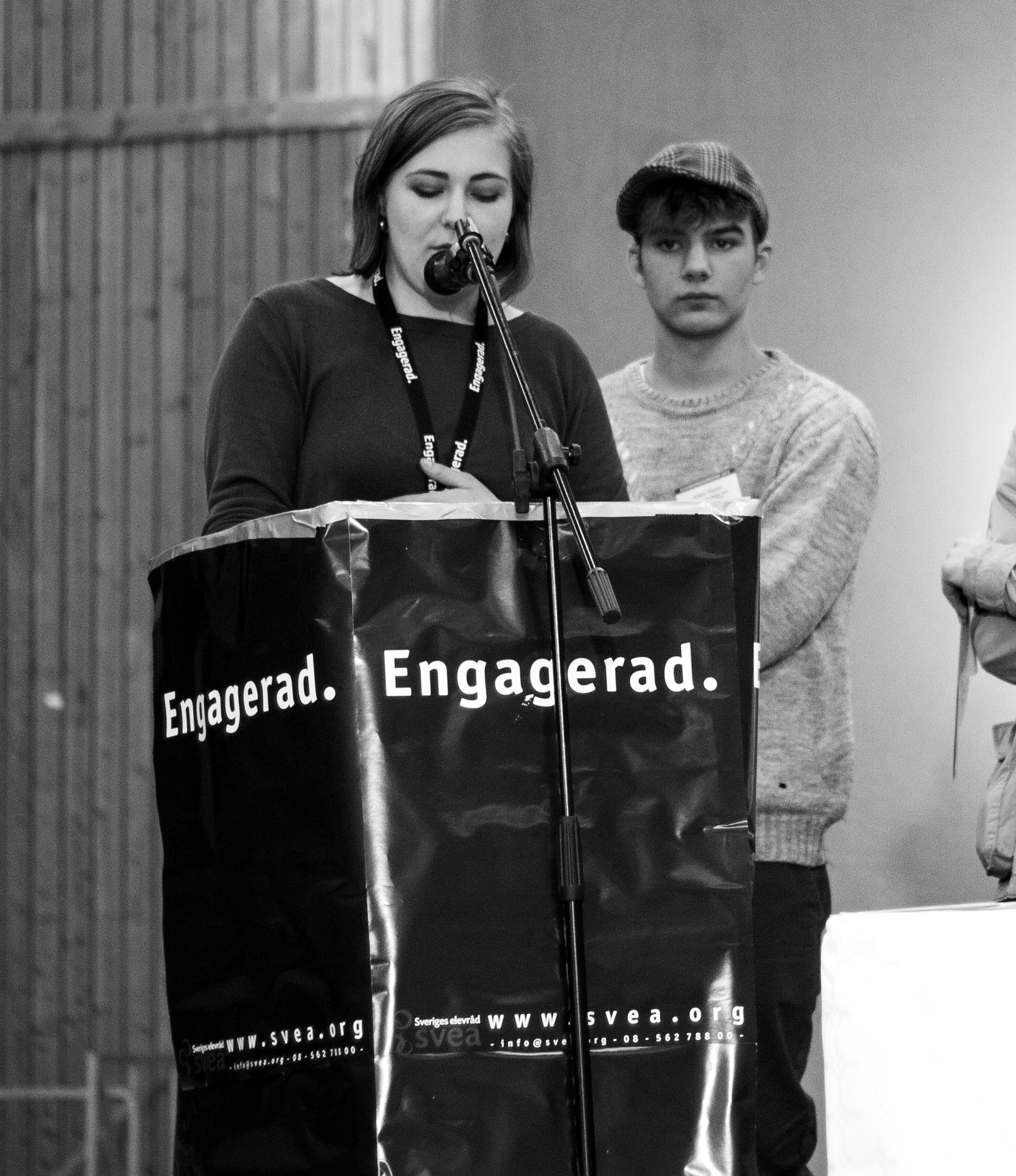 Mimmi Garpebring, förbundsordförande för Sveriges elevråd – SVEA, talar vid Elevrådskongressen 2012 i Klågerup.